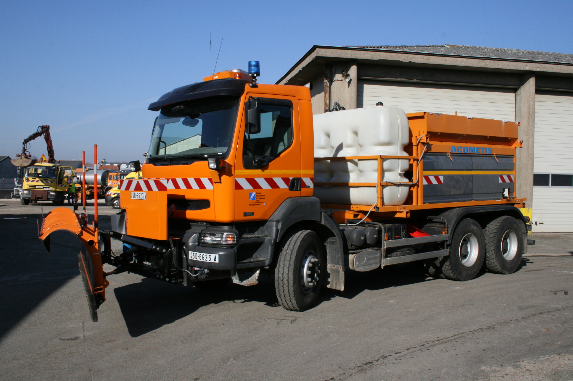 Epandeuse(outil de répandage du sel pour le déneigement des routes) sur porteur équipé d'une lame biaise pour le raclage de la neige.